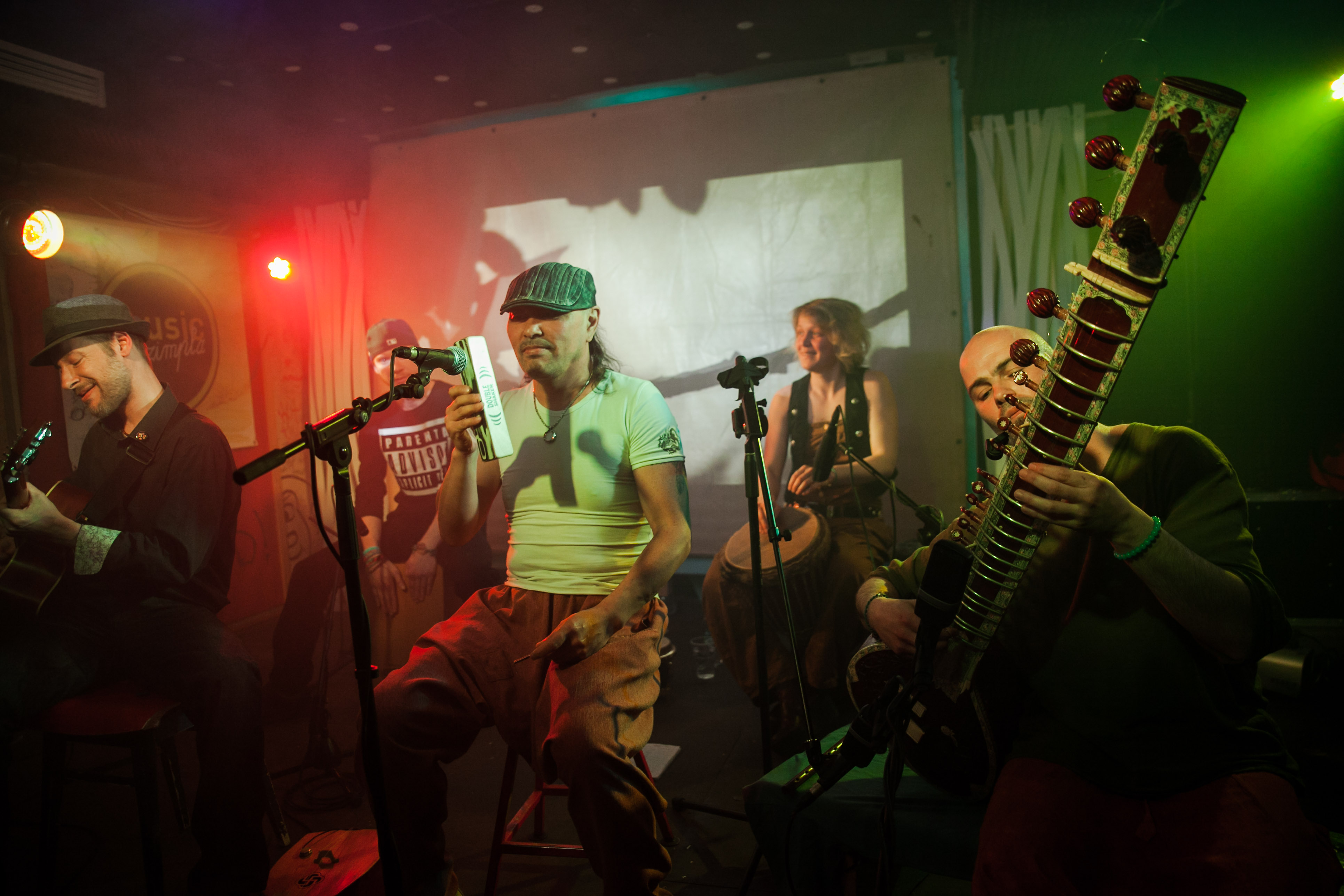 DzsinnKalaDzsi játszik a Szimpla Kert-ben Budapesten a Szimpla Lemming Program keretében